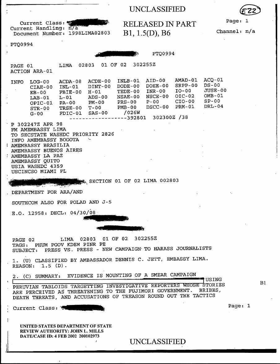 Primera página del documento de la CIA a la prensa chicha